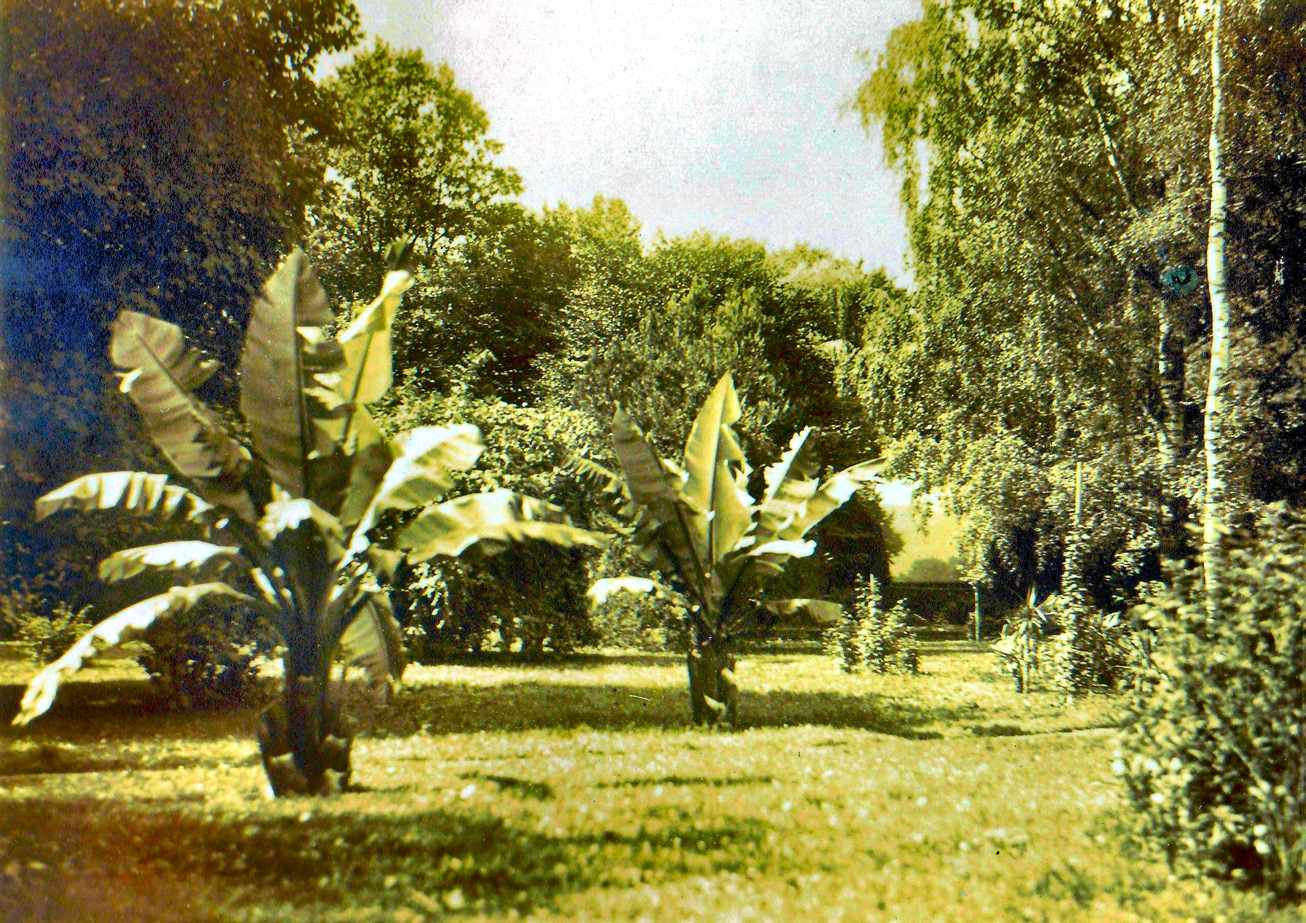 Foto vom Schlosspark Berhometh nach 1900, koloriert, Schloss der Freiherren, später Grafen Wassilko von Serecki